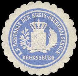 Sealing stamp Title: Königlich Bayerische Rektorat der Kreis - Oberrealschule Regensburg Description: hellblau, weiß, geprägt Place: Regensburg size: 4 cm